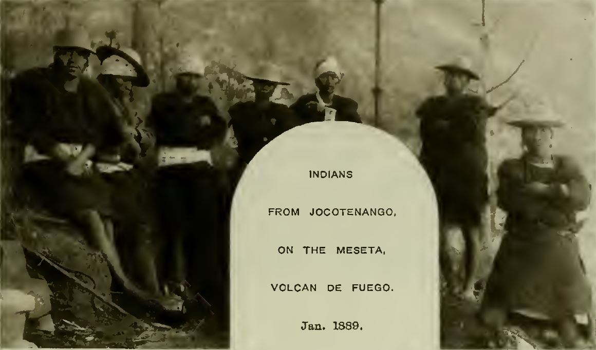 Indígenas de Jocotonenago en la meseta del Volcán de Fuego en 1889.